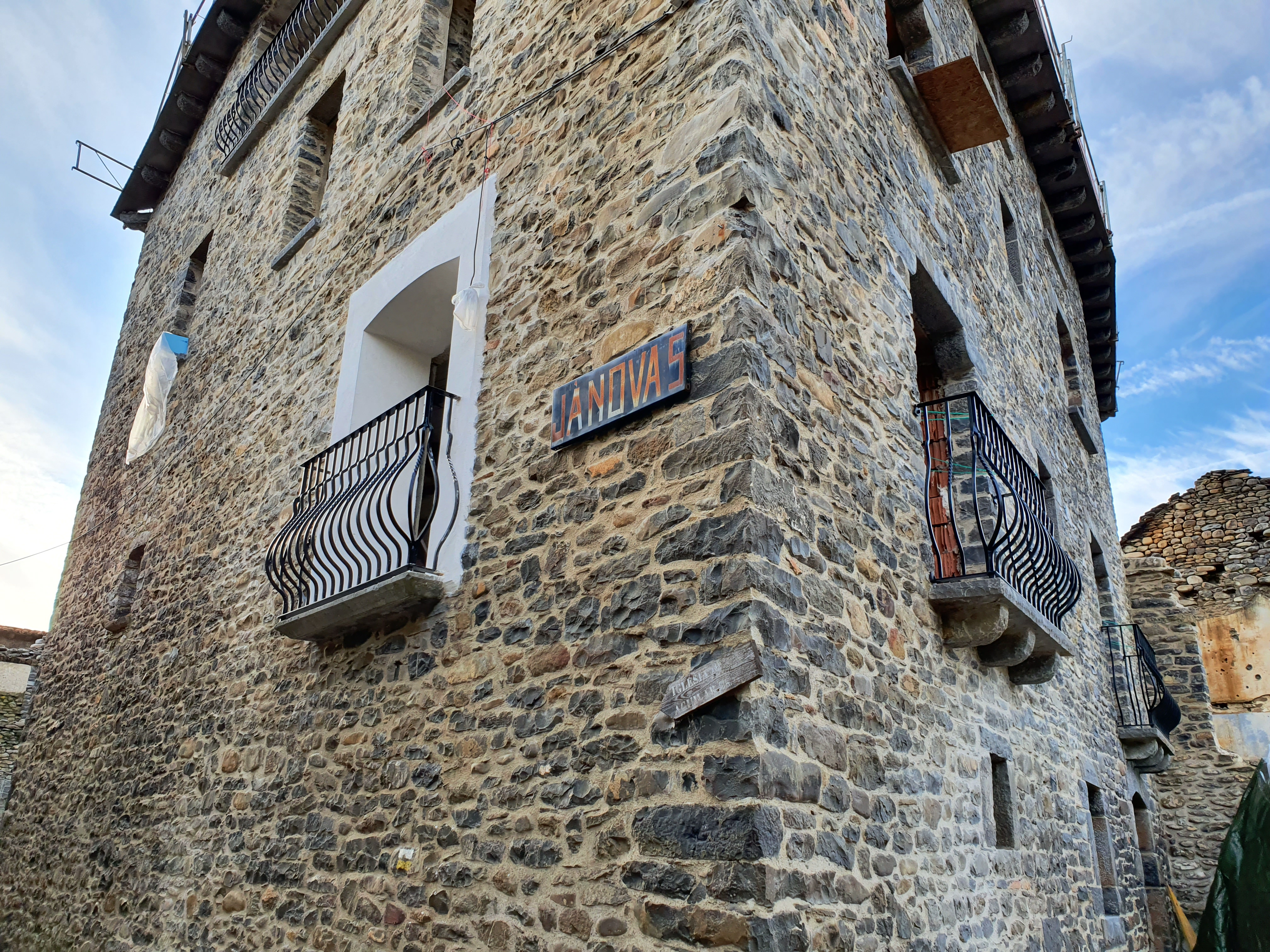 Realizada en enero de 2020